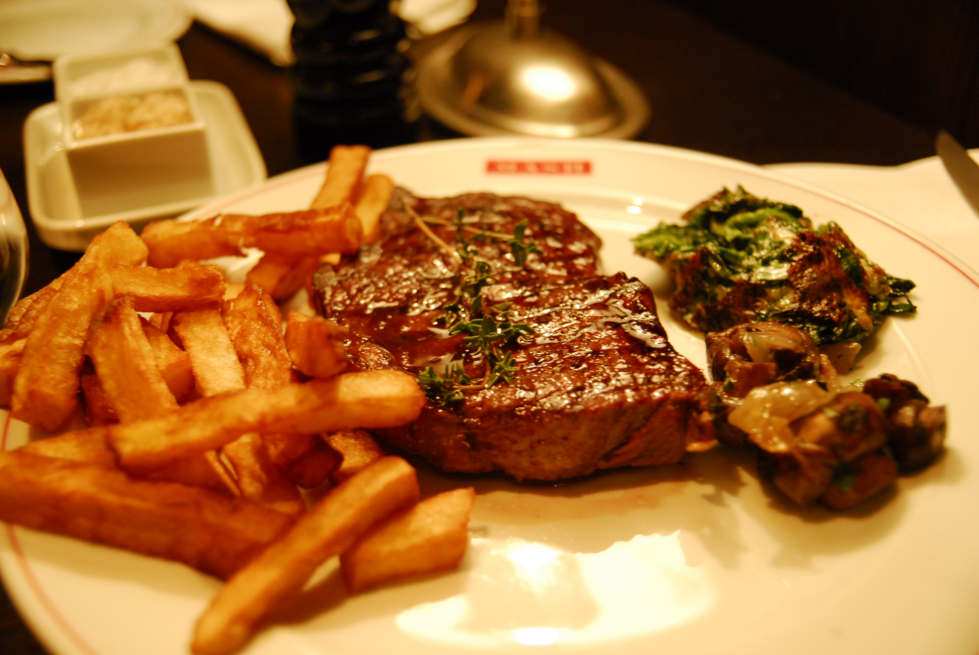 Ribeye med pommes frites